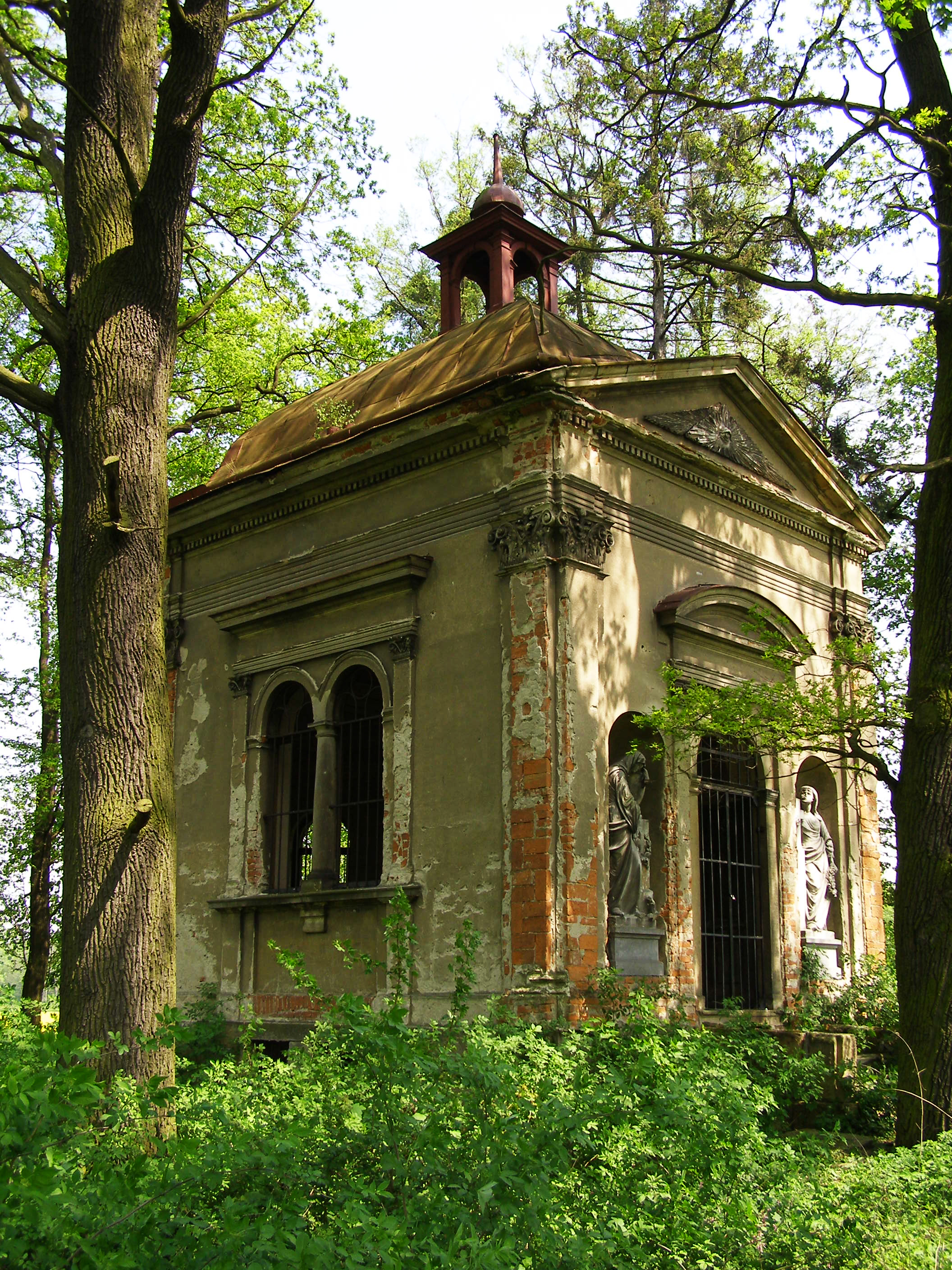 Hrobka rodu Baillou (Hustopeče nad Bečvou), Hustopeče nad Bečvou